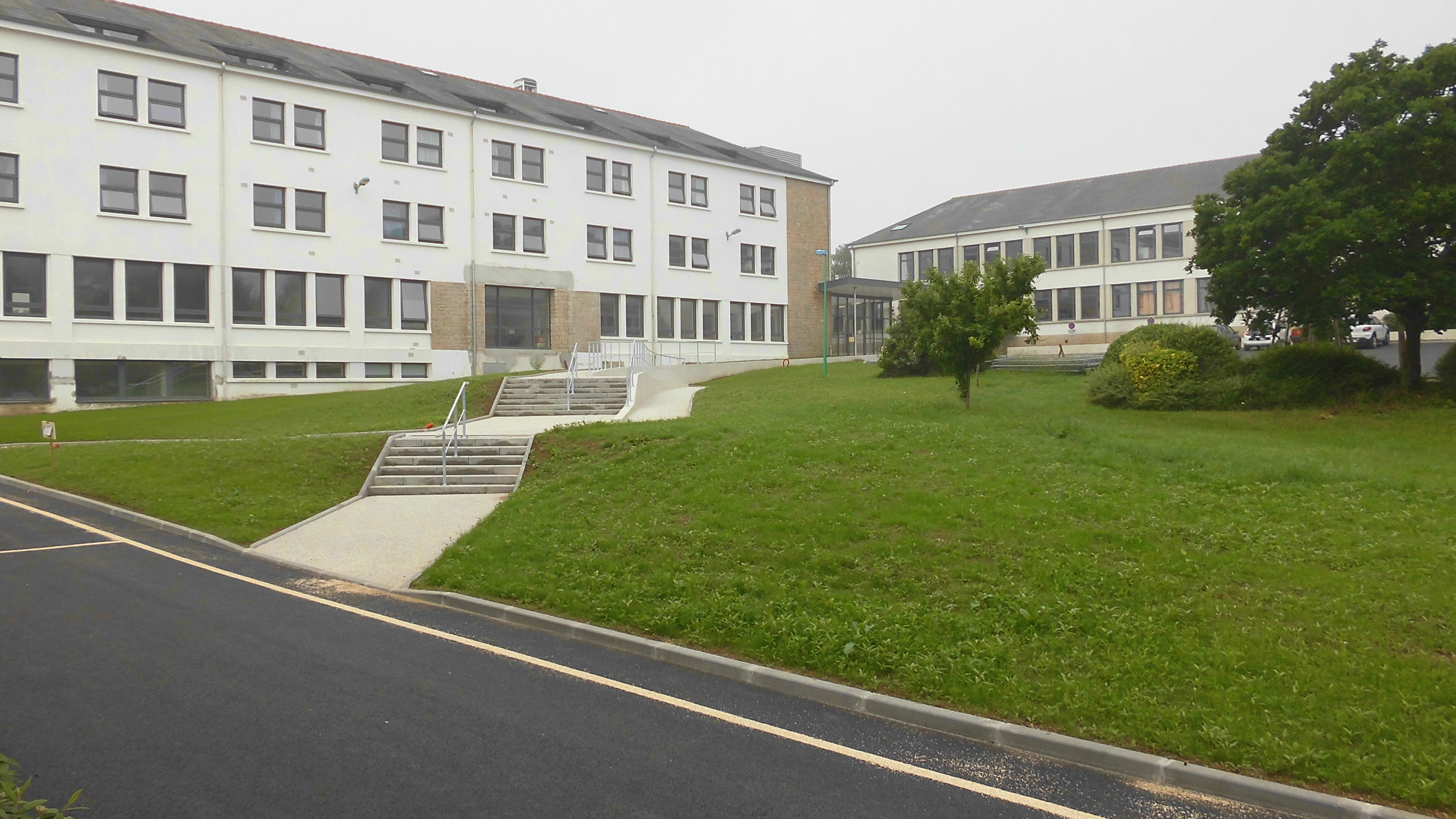 Le lycée agricole de Suscinio a été bâti près du château de Suscinio à Ploujean. Il a bénéficié de travaux de rénovation importants, en 2018, mis en oeuvre par la région Bretagne.